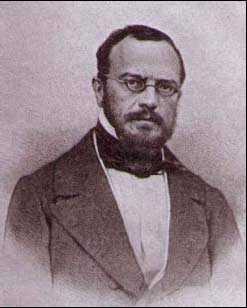 Ivan Vasilevic Kireevskij (1806-1856)